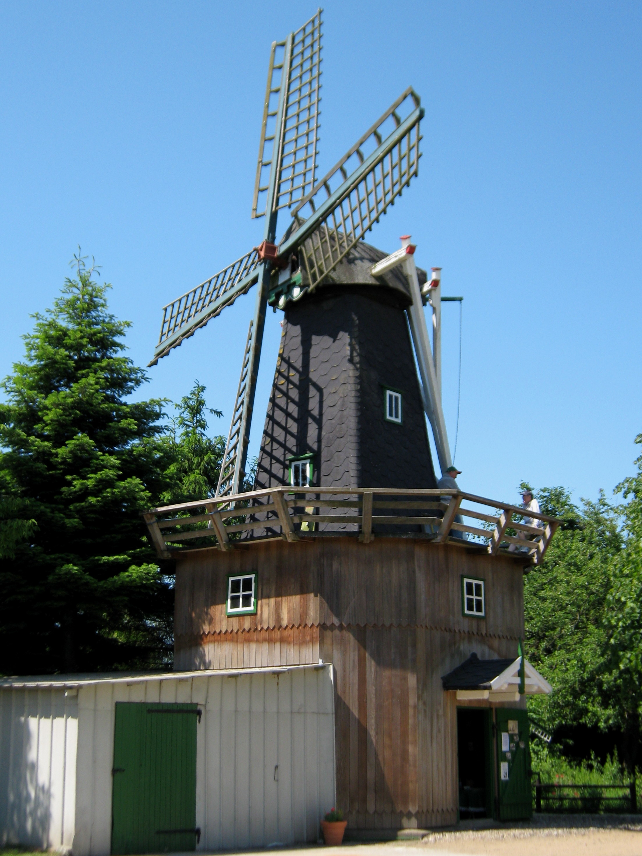 Windmühle Fortuna, Süderort 18, Dellstedt. Kleine Bauernmühle von 1926, in Eigenbauweise errichtet